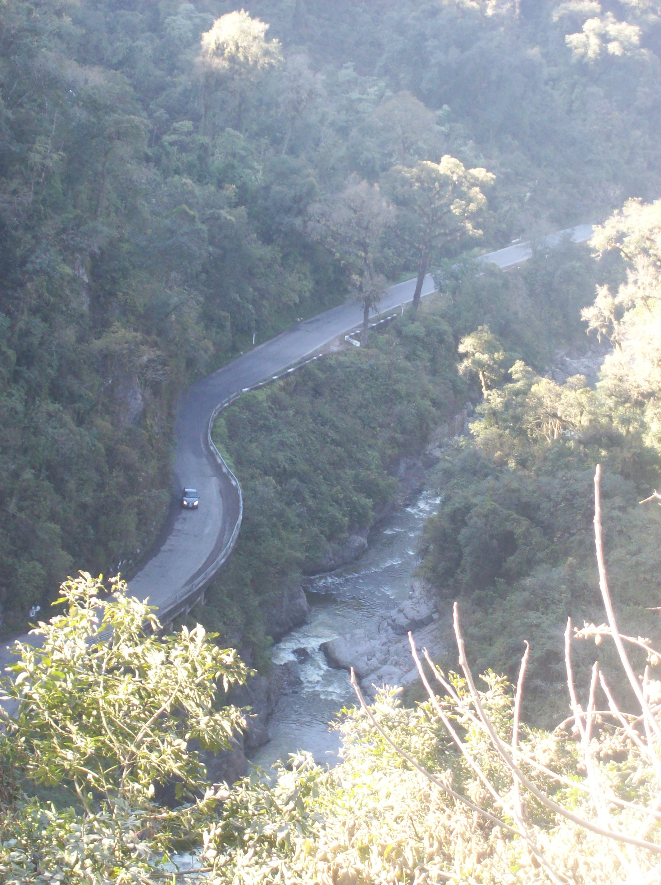 Ruta Provincial 307 y Río Los Sosa desde el Monumento al Indio, camino a Tafí del Valle, provincia de Tucumán, Argentina.